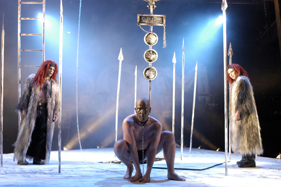 Szene aus Titus Andronicus von William Shakespeare. Landesbühne Niedersachsen Nord, Saison 2004/2005, Regie: Reinhardt Friese